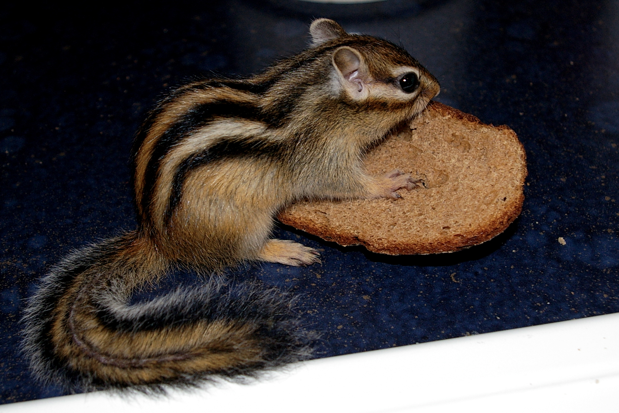 Streifenhörnchen knabbert an Brotrinde